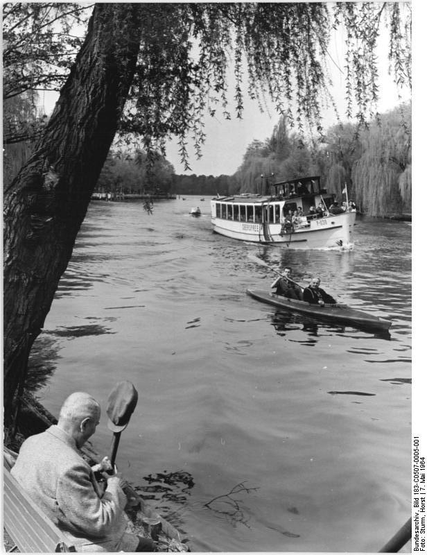 Zentralbild-Sturm Me 7.5.64 Berlin: An der Müggelspree am Kleinen Müggelsee. Viele Berliner verlebten "Himmelfahrt" in der schönen Umgebung der Hauptstadt."